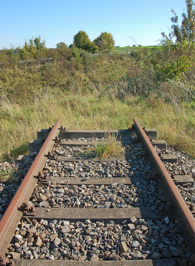 Unterbrechung der Bahnstrecke Ludwigsburg-Markgröningen bei der Ostumgehung Markgröningen